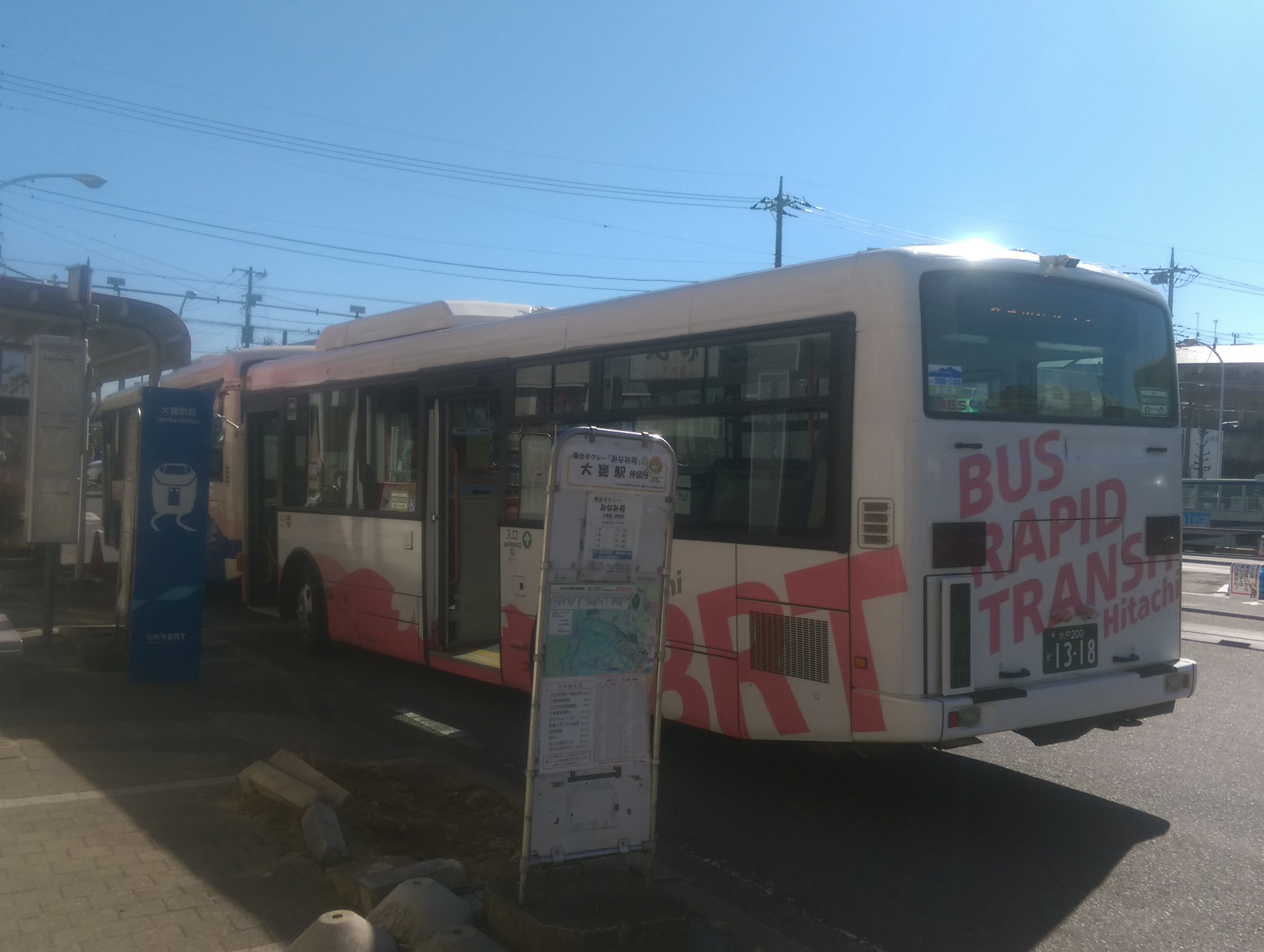 JR東日本 常磐線 大甕駅前にある、ひたちBRTのバス停留所と停車中のバス